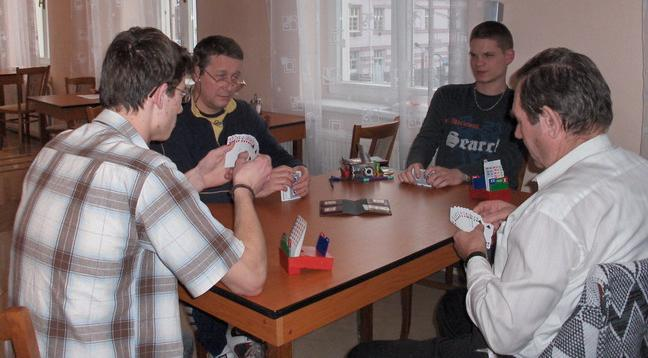 Zľava doprava: Tóth, Karol Lohay, Michal ?ikra, Koloman Hencz